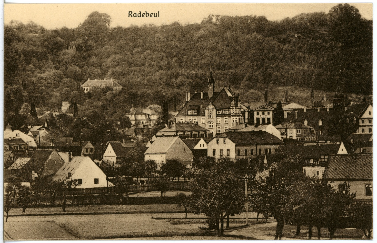 Radebeul; Schule This postcard is from publisher Brück & Sohn in Meißen ( postcard has a unique number 25177 and is available in a higher resolution at the publisher. This images was uploaded in a cooperation project between Wikipedians and the publisher.